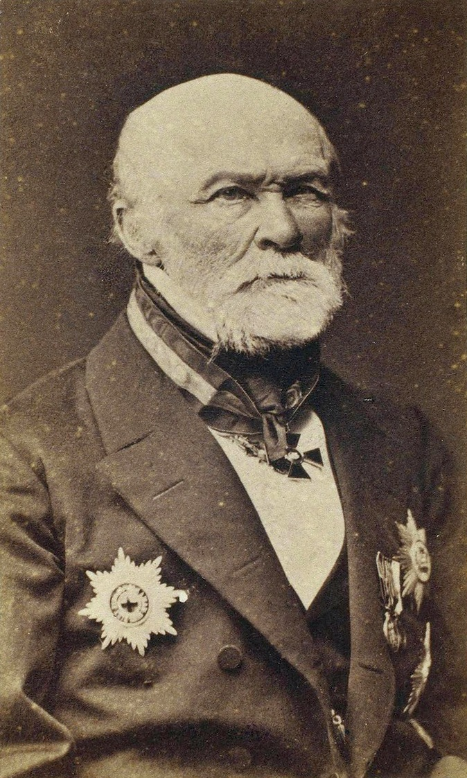 Никола́й Ива́нович Пирого́в (1810— 1881) — русский хирург и анатом, естествоиспытатель и педагог, создатель первого атласа топографической анатомии, основоположник русской военно-полевой хирургии, основатель русской школы анестезии.